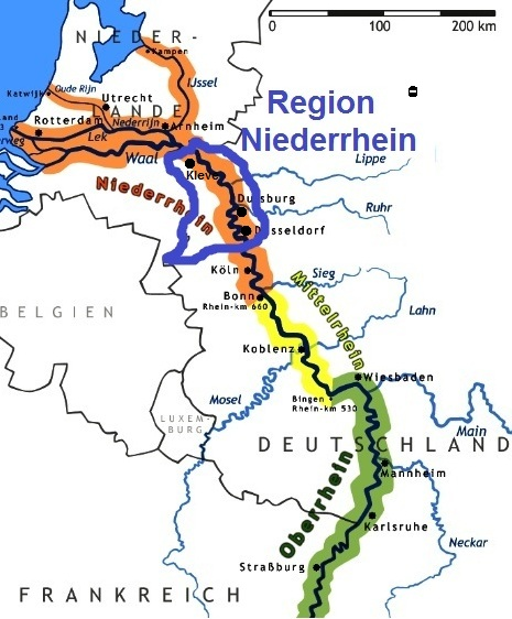 Niederrhein - Ausschnitt und Ergänzung einer ursprünglich von "Threedots" im Jahre 2005 gezeichneten und freigegebenen Karte